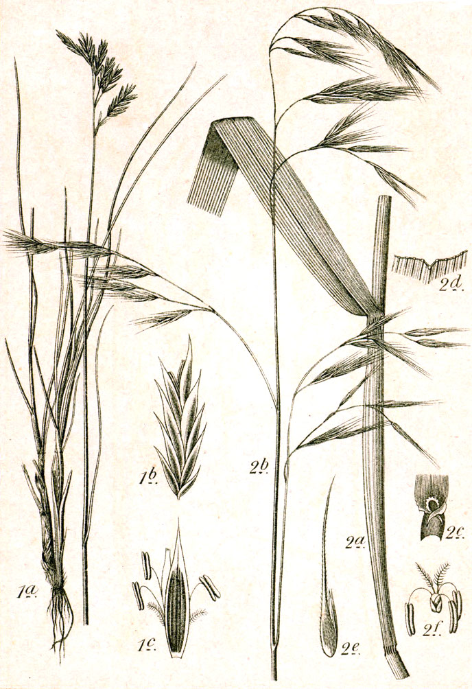 2. Festuca gigantea (L.) Vill., syn. Schedonorus giganteus (L.) Holub Original Caption 1. Bunter Schwingel, Festuca varia Haenke 2. Riesen-Schwingel, F. gigantea Vill.